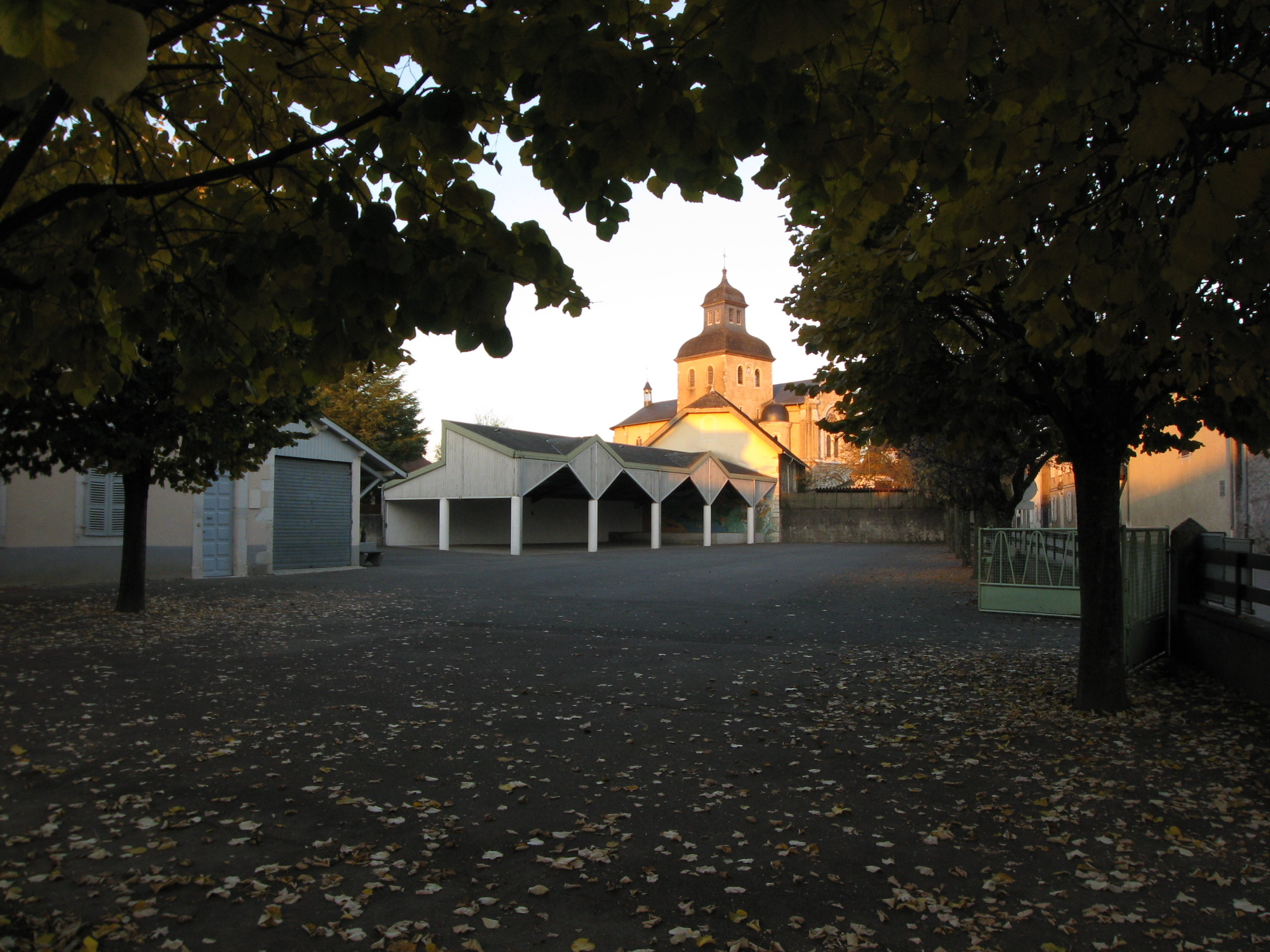 Ecole de Pardies-Piétat (Pyrénées).